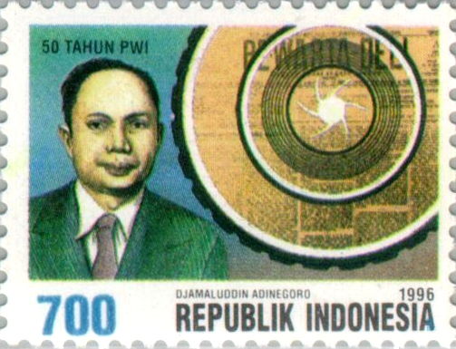 Djamaluddin Adinegoro